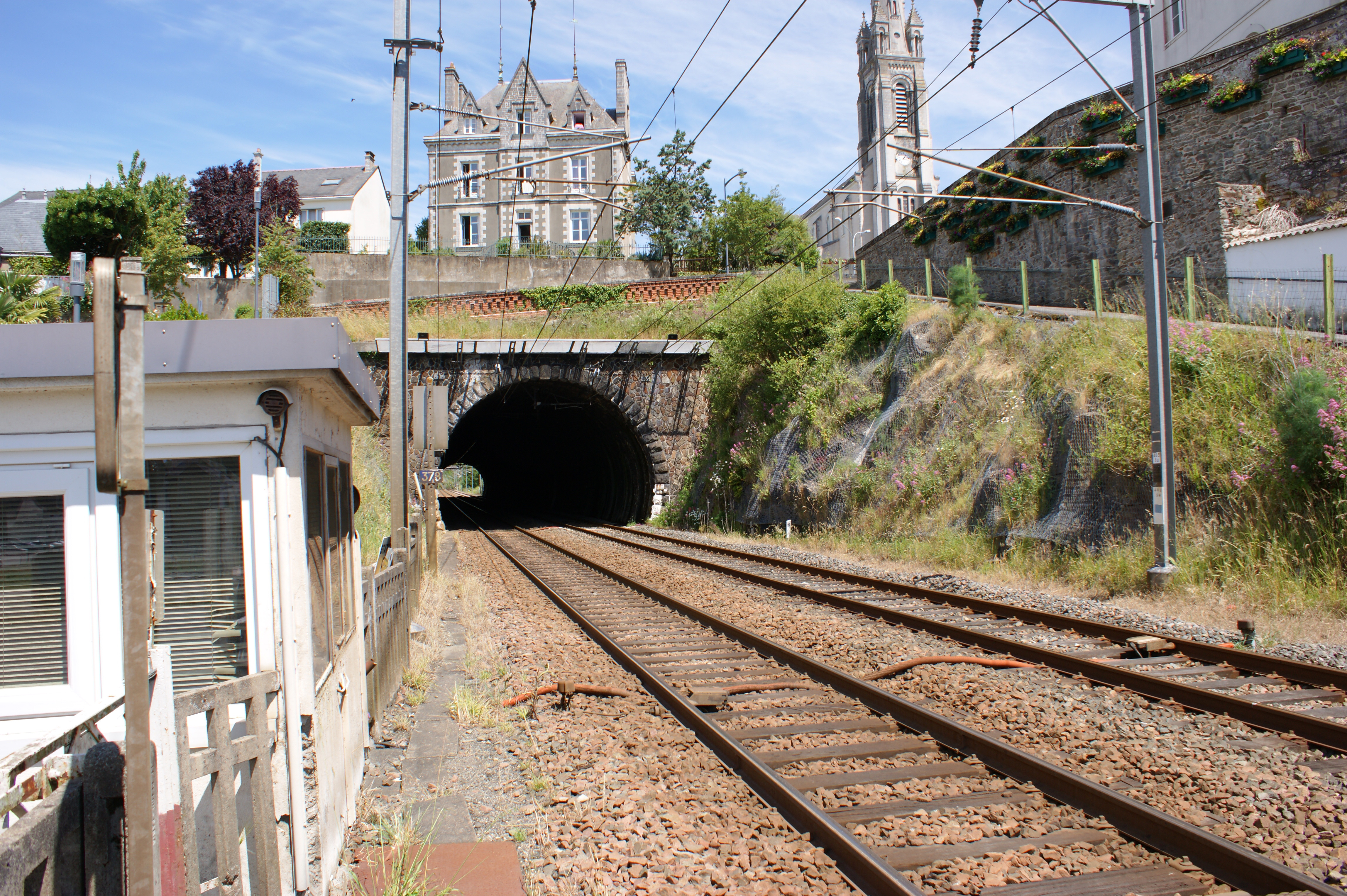 Le tunnel de Pontchâteau vu depuis le passage à niveau n°378, avec à gauche la guérite du garde barrière.